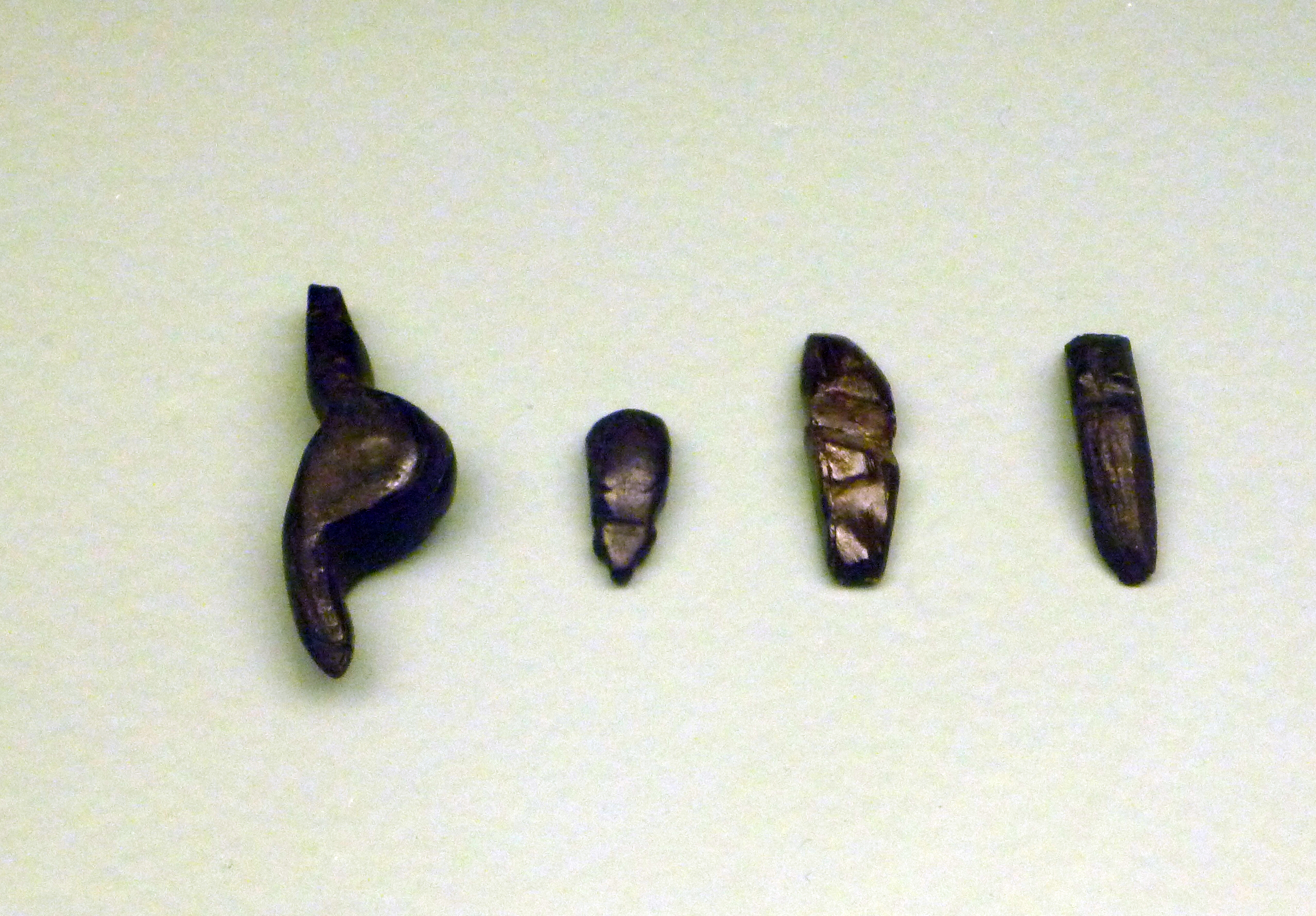 Venusfiguren vom Petersfels, fotografiert im Badischen Landesmuseum Karlsruhe. von links: Petersfelsvenus (Länge 4 cm), Käfer, zwei weitere Frauenstatuetten.